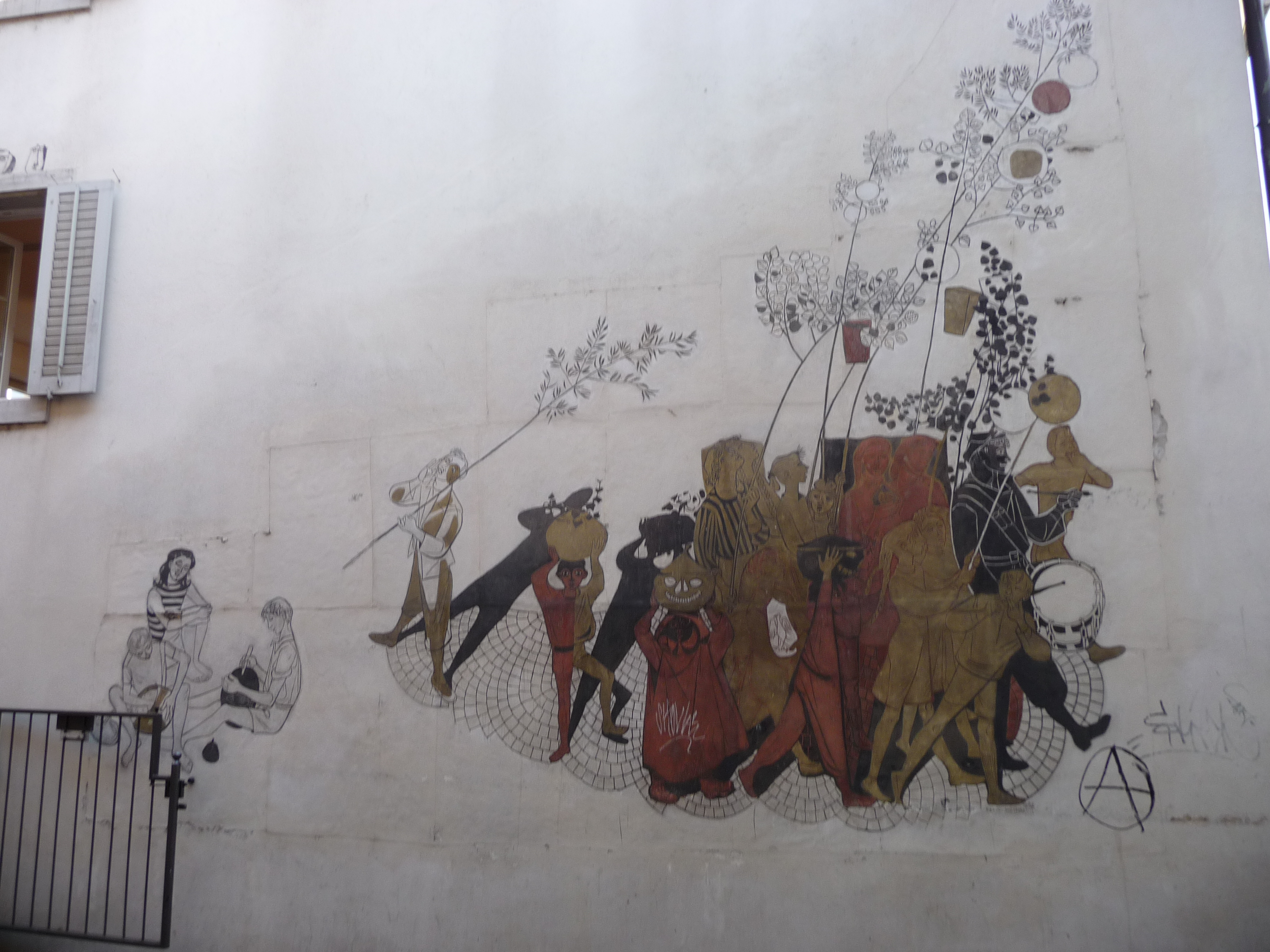 Graffito bei Obere Mühle in Aarau